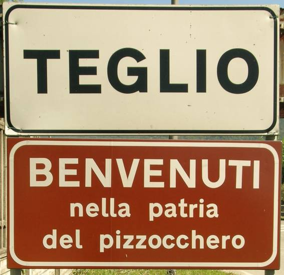 Teglio - patria del pizzocchero (Sondrio)